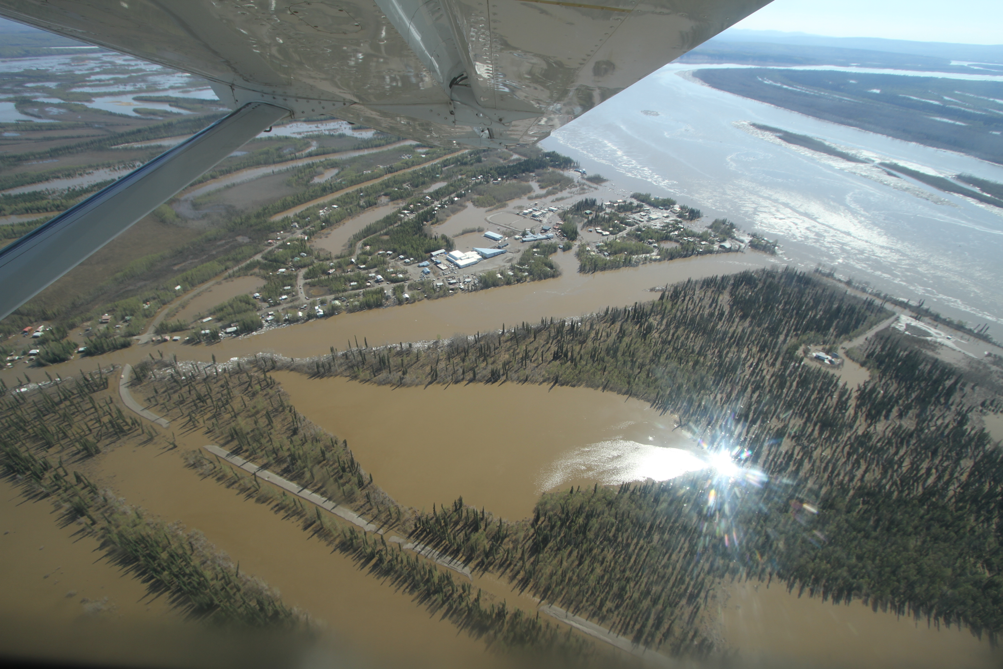 Galena, Alaska 5.30.13 After flooding